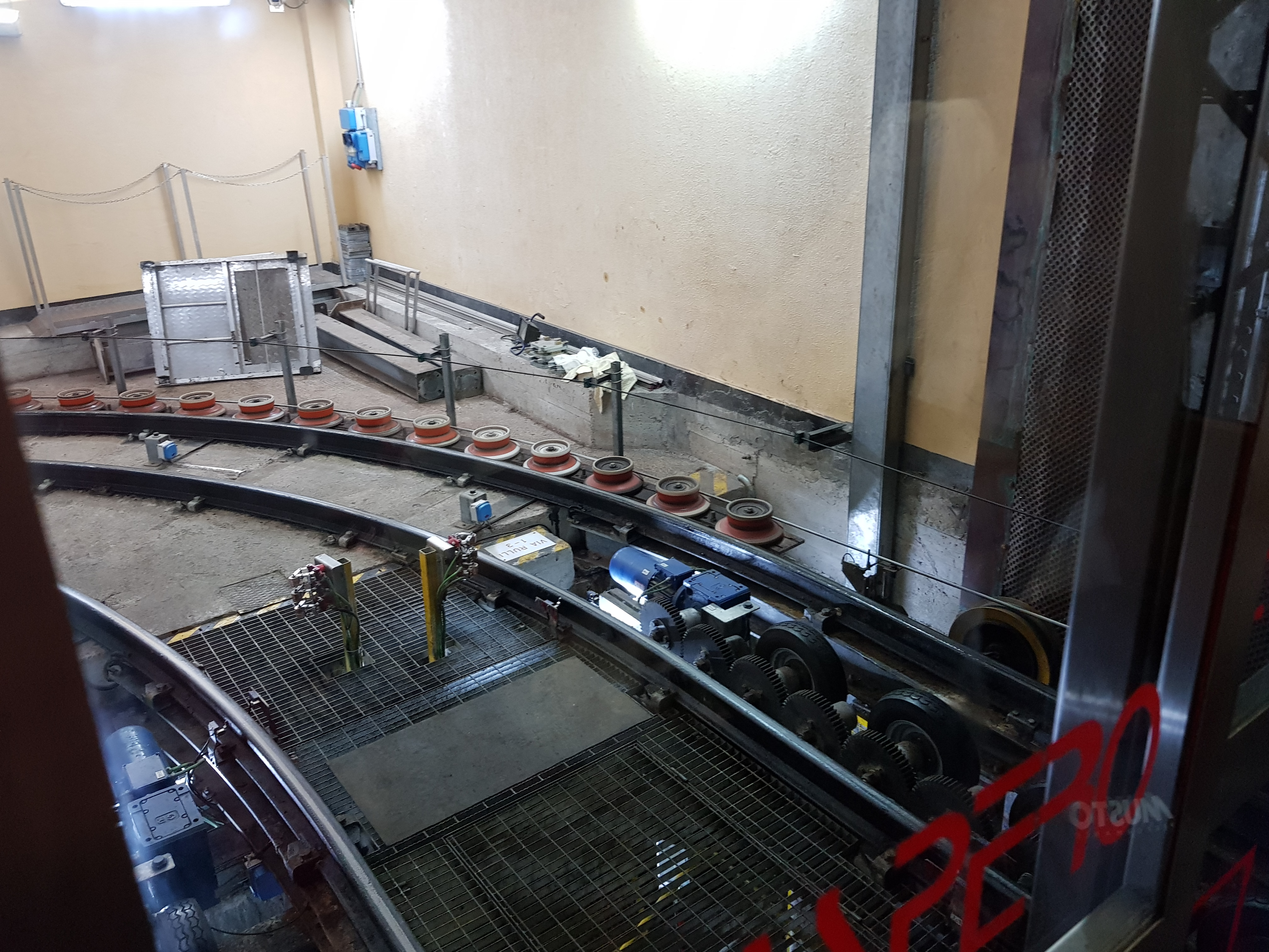 Ascensore Castello d'Albertis-Montegalletto a Genova